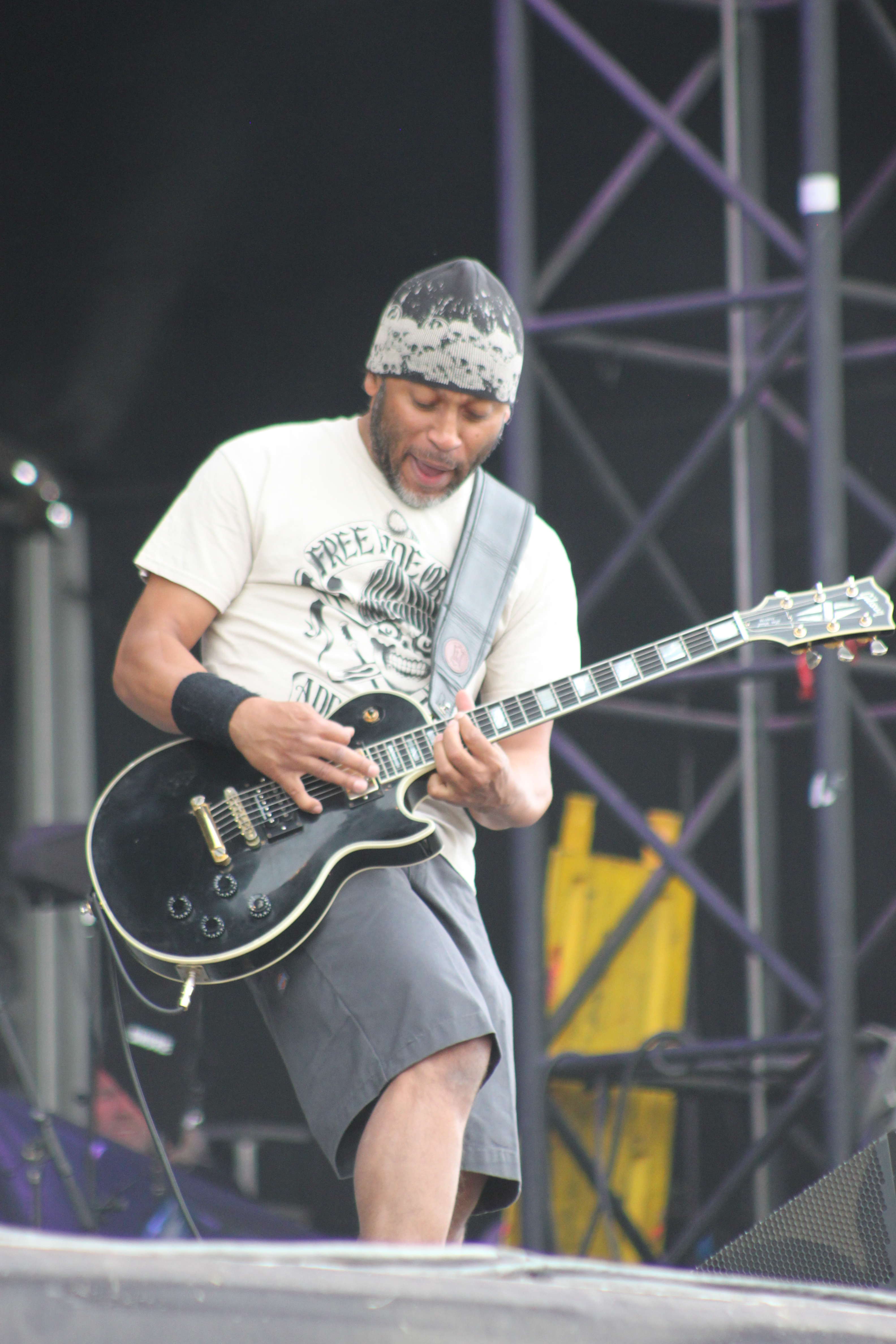 Hellfest 2014. Daniel Descieux, Lofofora. Fr-44-Clisson.